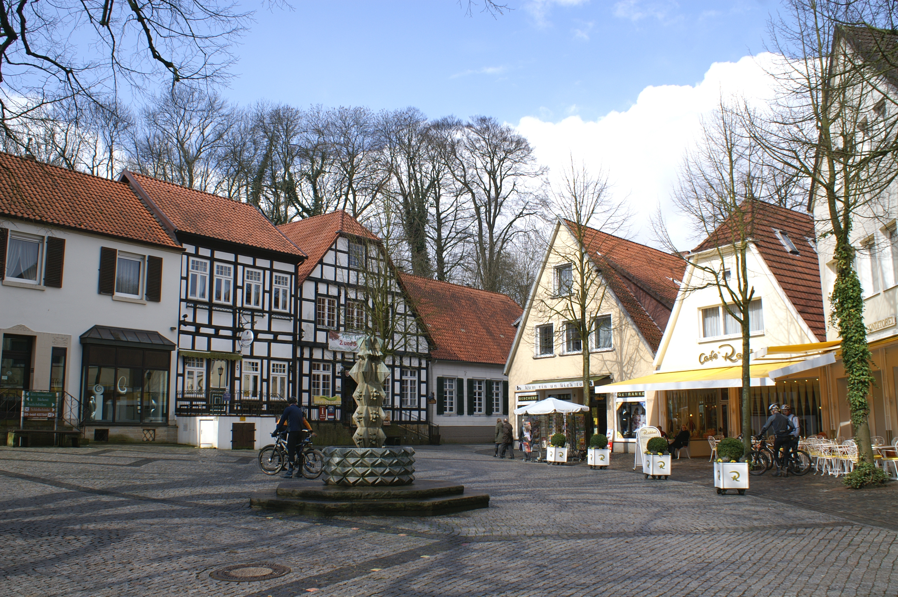 Der Marktplatz in Tecklenburg, Nordrhein-Westfalen